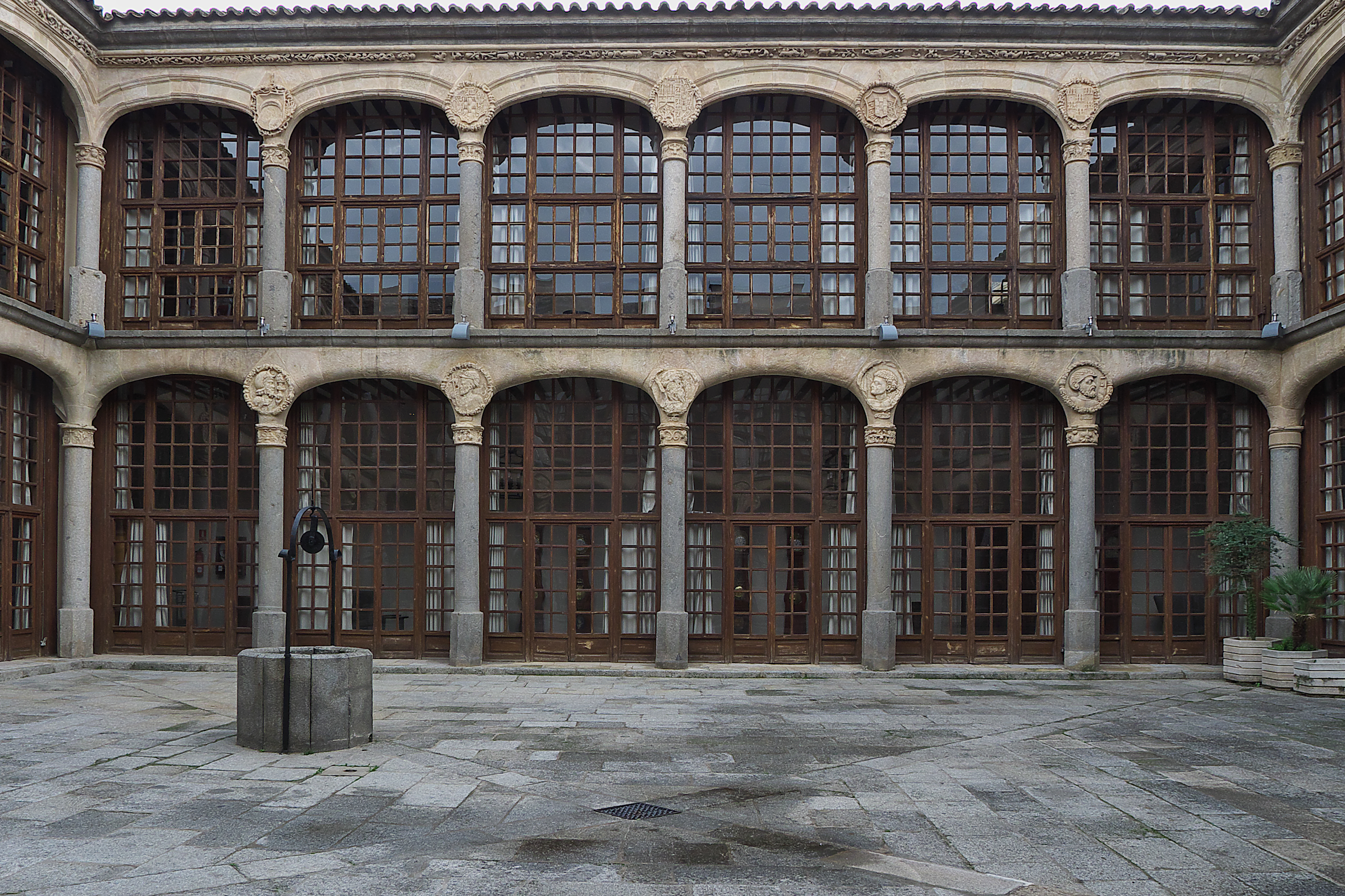 Palacio de los Condes de Alba y Aliste. Mandado a construir (1514) por Diego Enríquez de Guzmán, III Conde de Alba de Liste (†1556). Patio plateresco (ca. 1517-1524) que presenta elementos góticos con lo moderno, lo romano. Sus medallones en el cuerpo inferior representan los ejemplares héroes guerreros de la cultura clásica, bíblica o histórica, propios del arte renacentista.